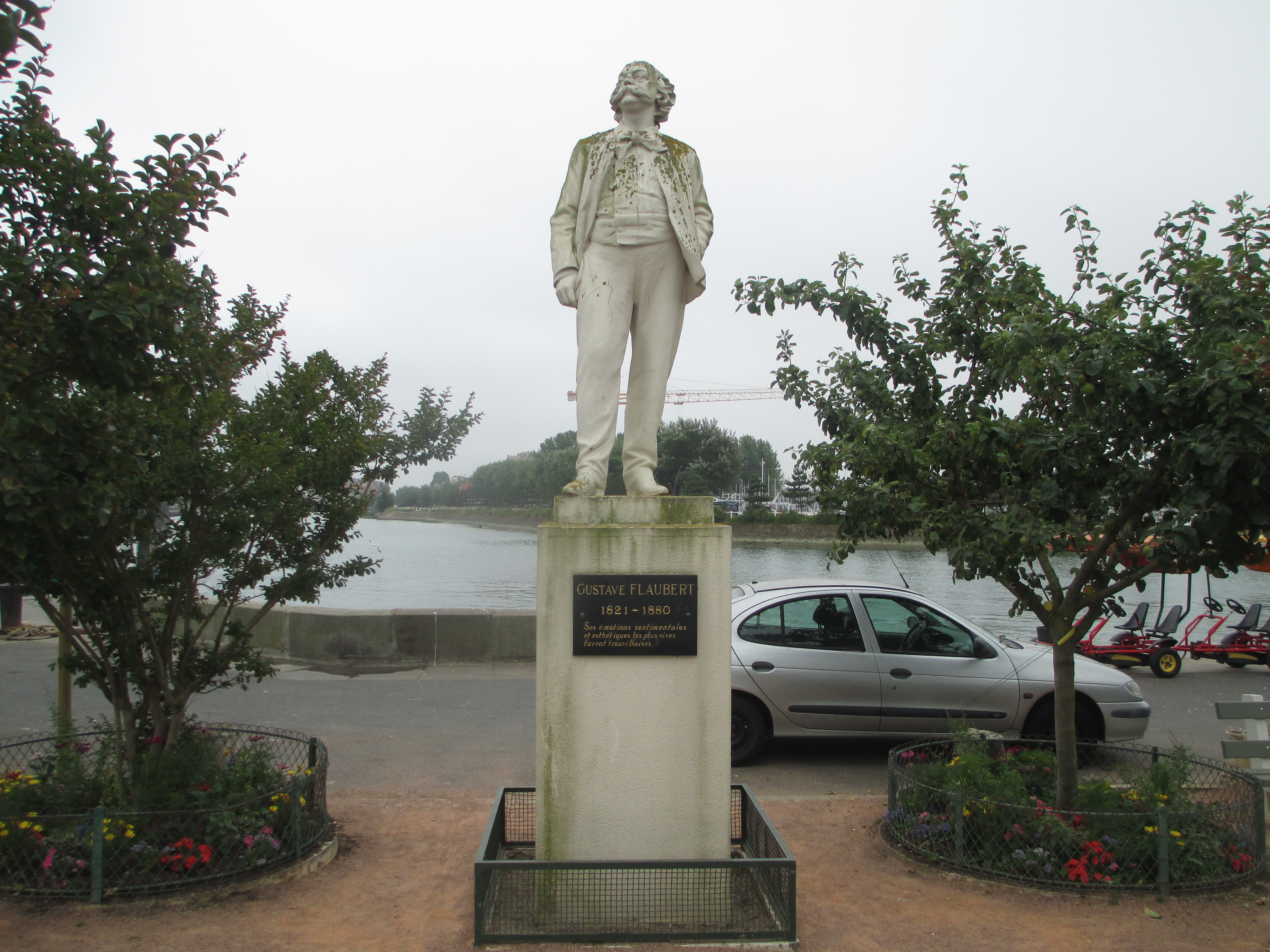 פסל של גוסטב פלובר בטרוביל, צרפת